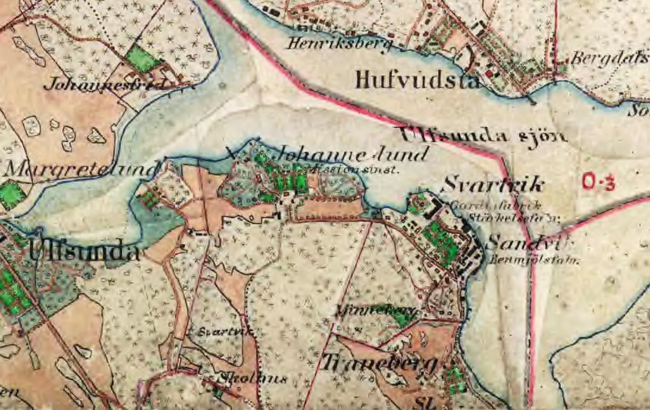 Ulvsundasjön, Huvudsta, Ulvsunda slott, Minneberg, Svartvik, Sandvik m.fl.